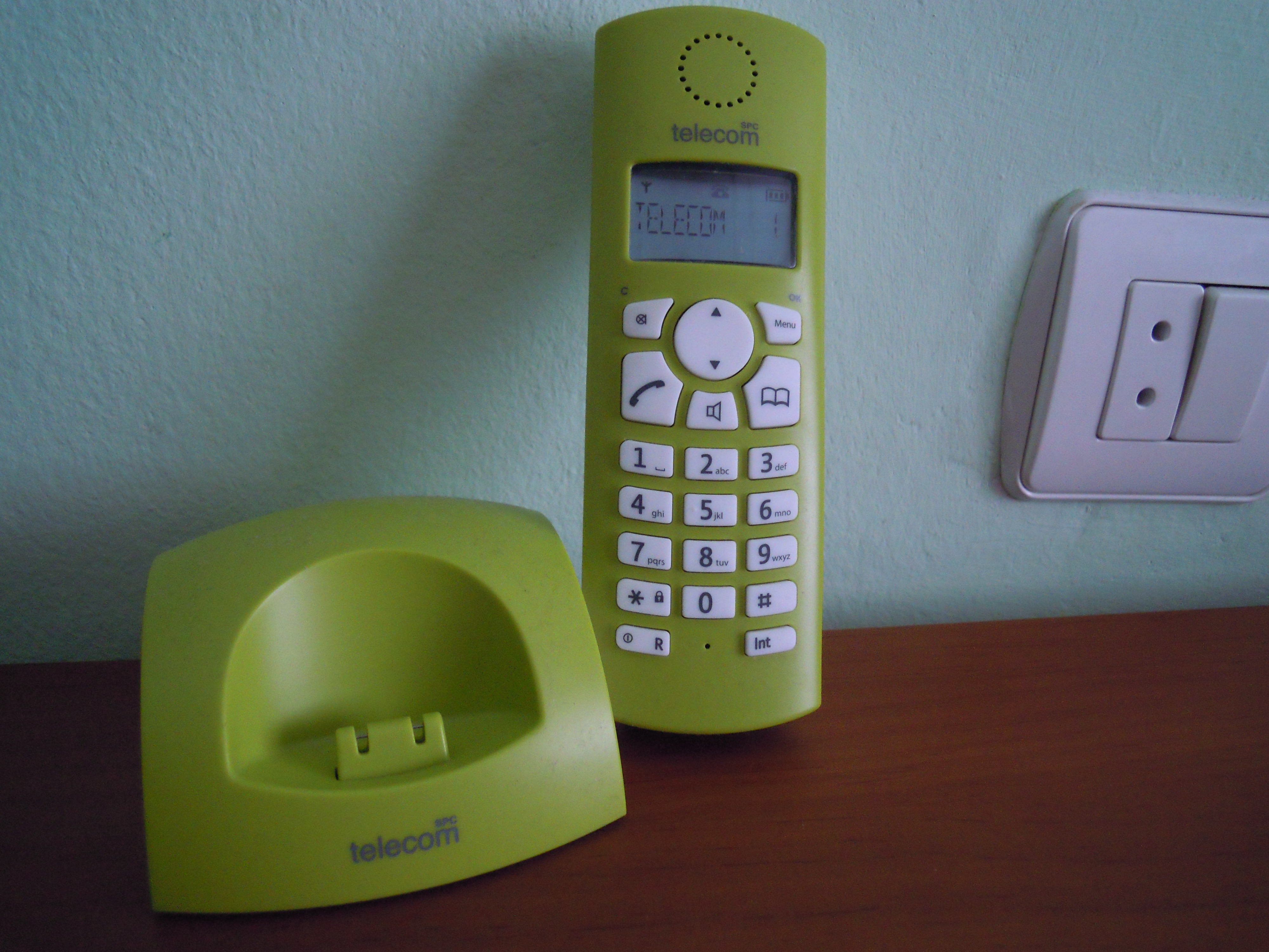 Teléfono inalámbrico